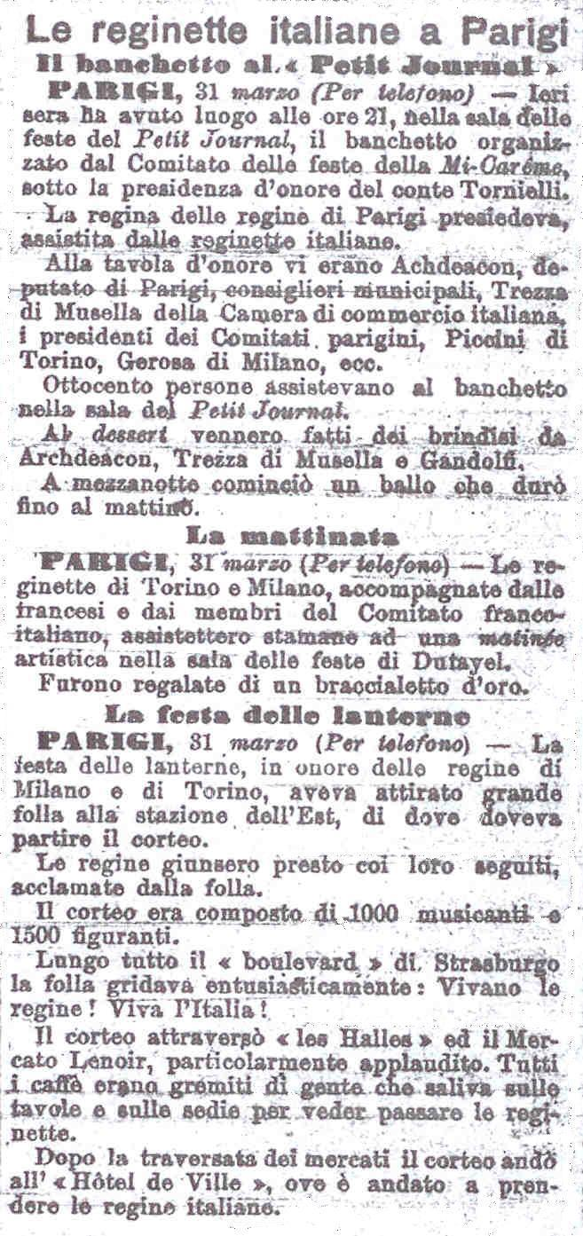 Article de la Gazzetta del Popolo de Milan, à propos des reines italiennes venues participer aux fêtes de la Mi-Carême à Paris.